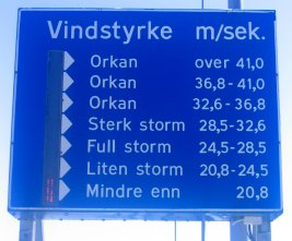 Bilde av tavla som viser vindstyrke på Måløybrua